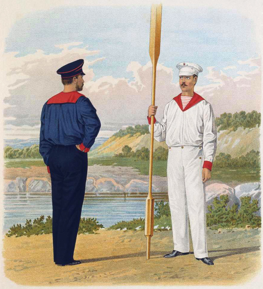 Аму-Дарьинская Флотилия. Добавочное обмундирование нижних чинов команды флотилии при нахождении на судах. ( приказ по воен. вед 1892 г. № 100 )